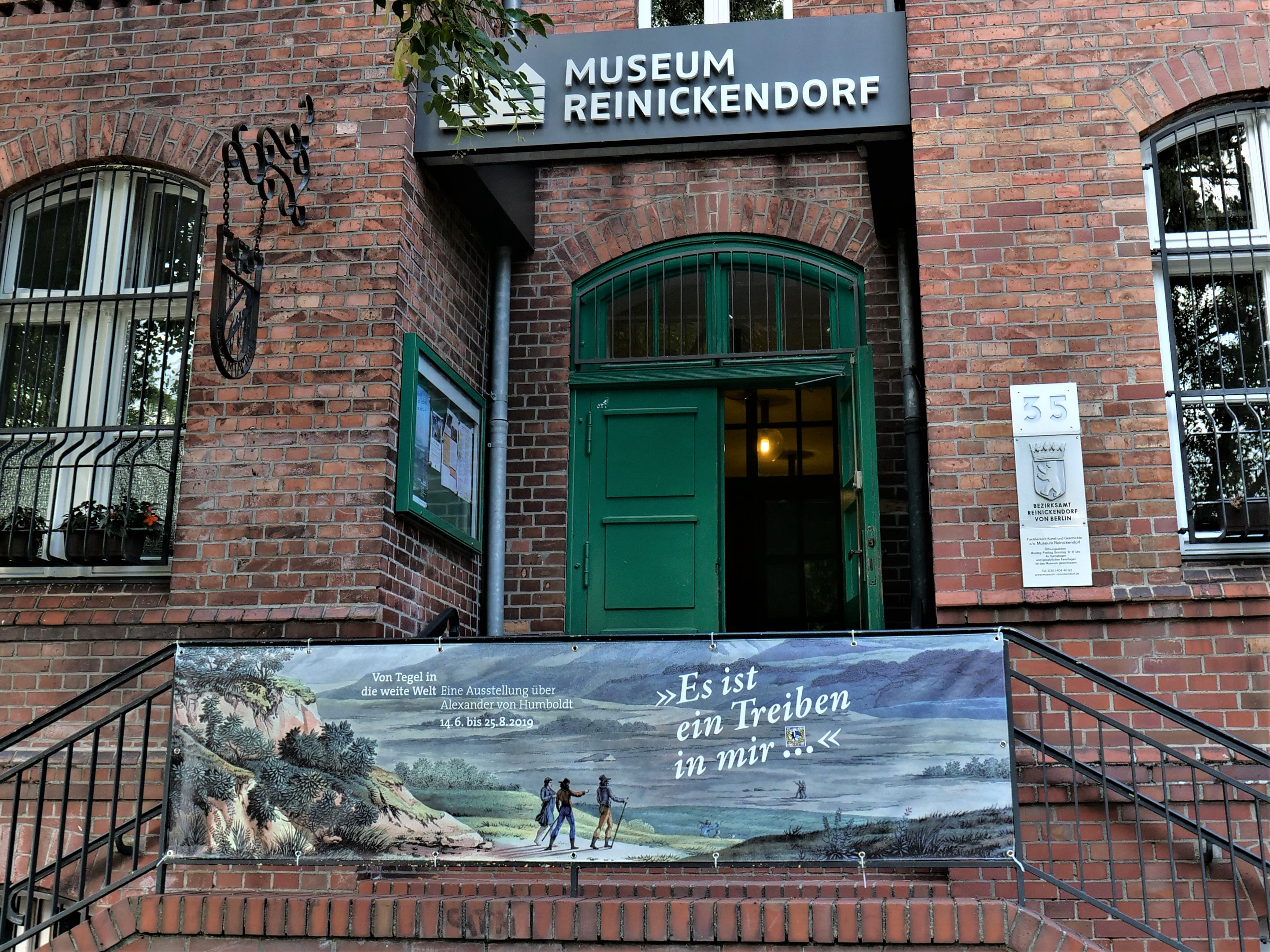 Alexander von Humboldt-Ausstellung anlässlich des 250. Geburtstags im Museum Reinickendorf - Transparent vor dem Museumseingang